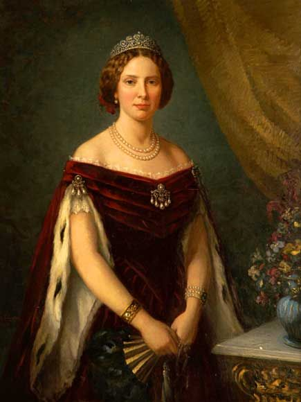 Portrait de Louise de Suède et de Norvège